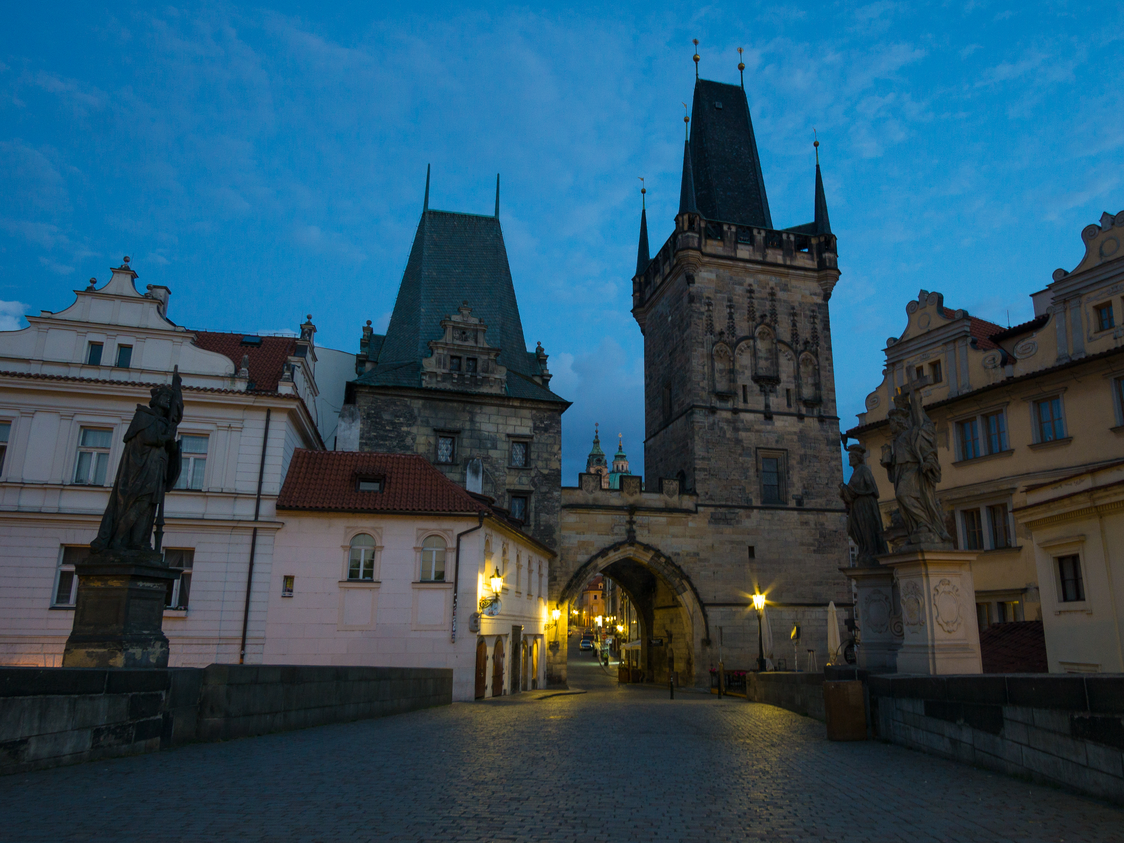 Brückentürme auf dem Westende der Karlsbrücke